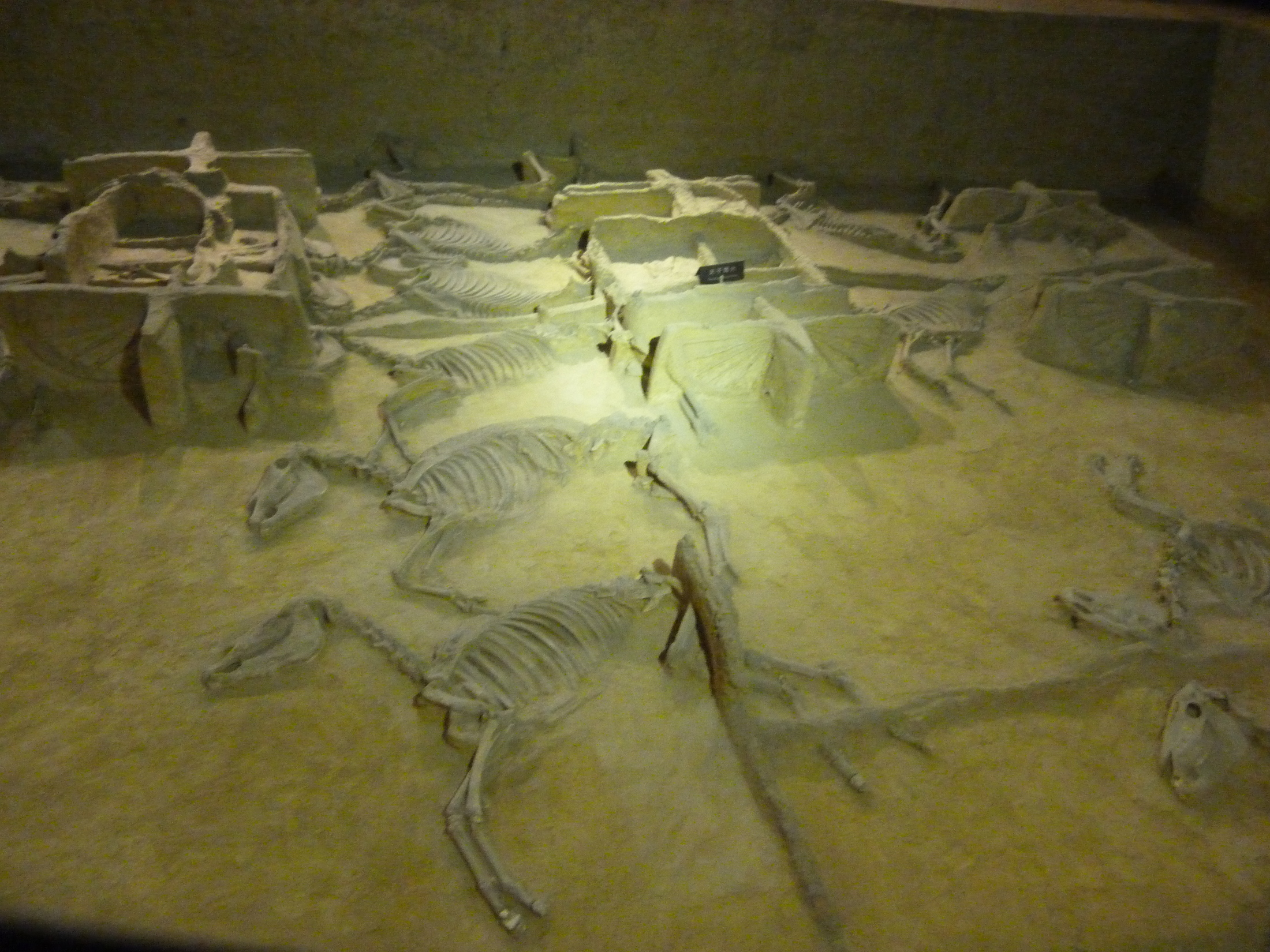 洛阳天子驾六博物馆车马坑